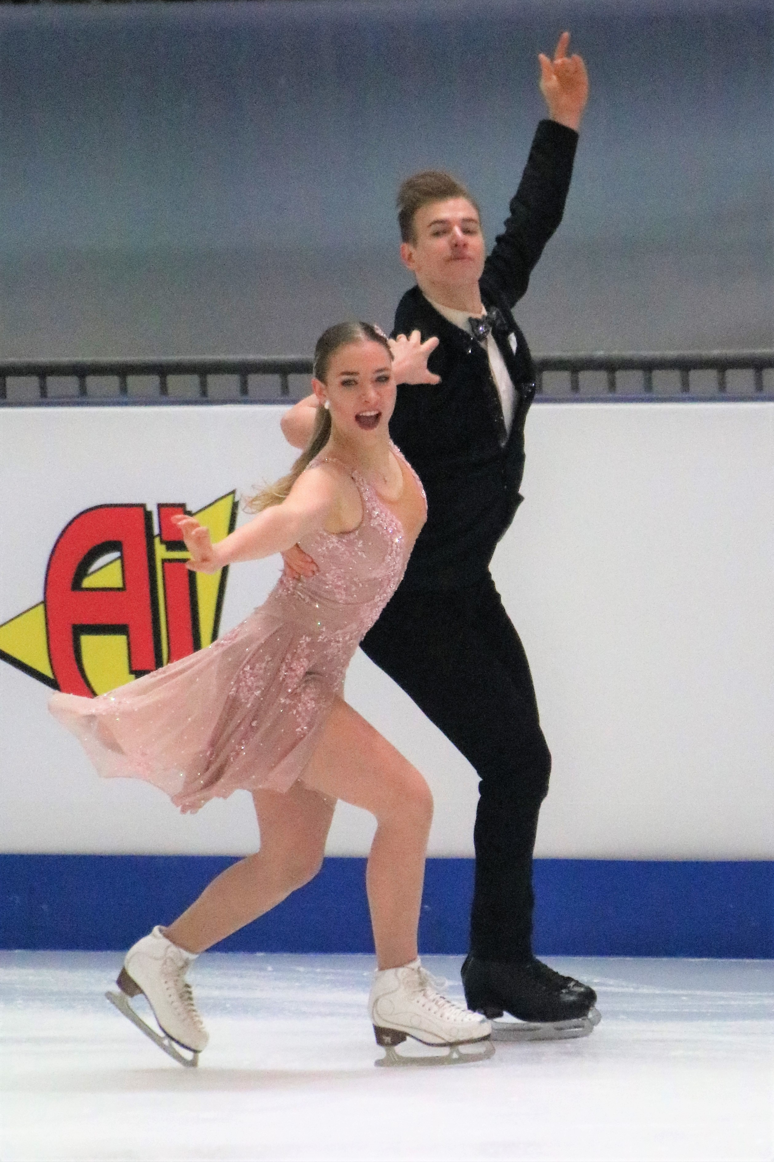 Натали Ташлерова и Филип Ташлер (Чешская Республика) на чемпионате Европы по фигурному катанию 2020